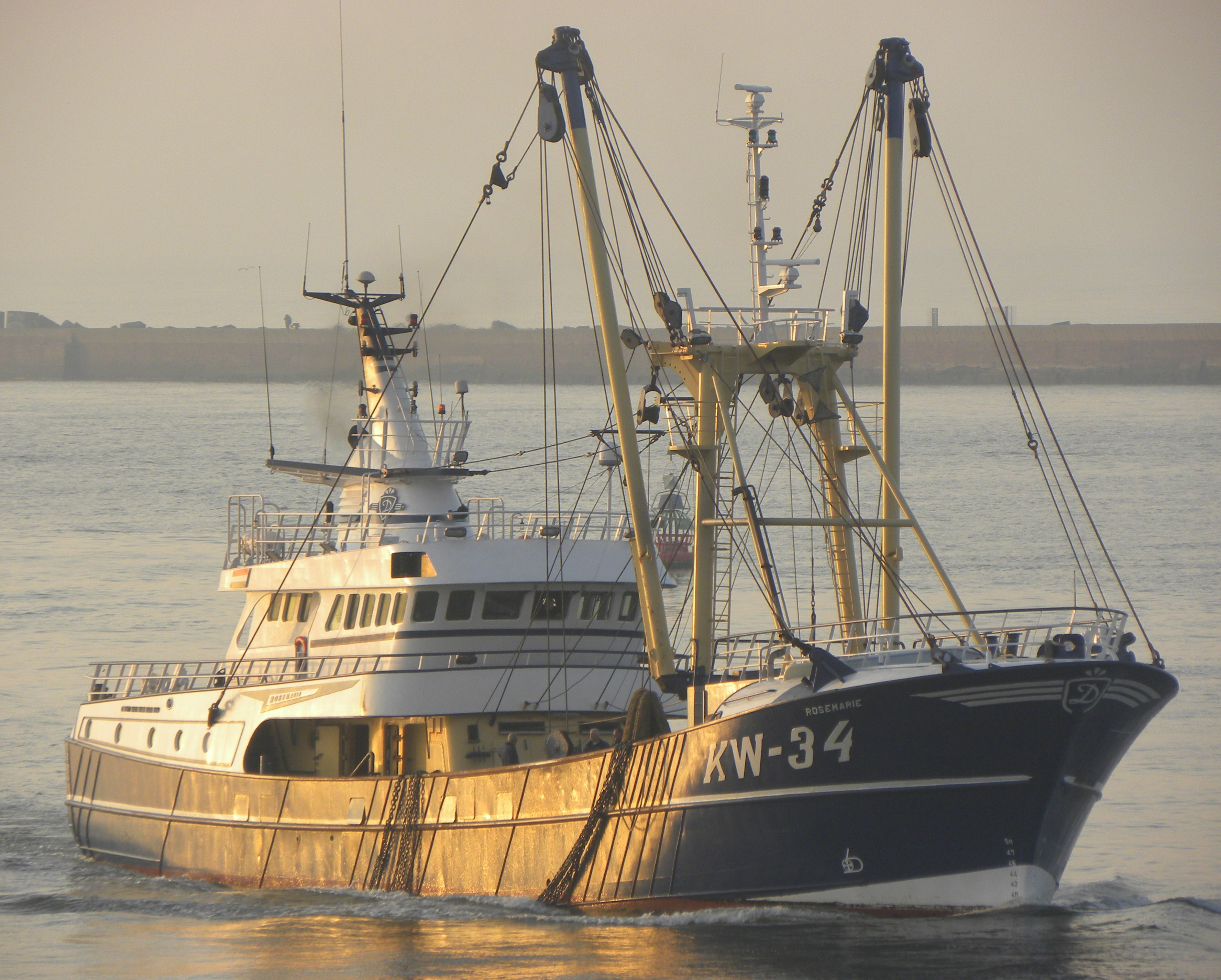 KW - 34 Rosemarie - Katwijk aan Zee -was build in 1997